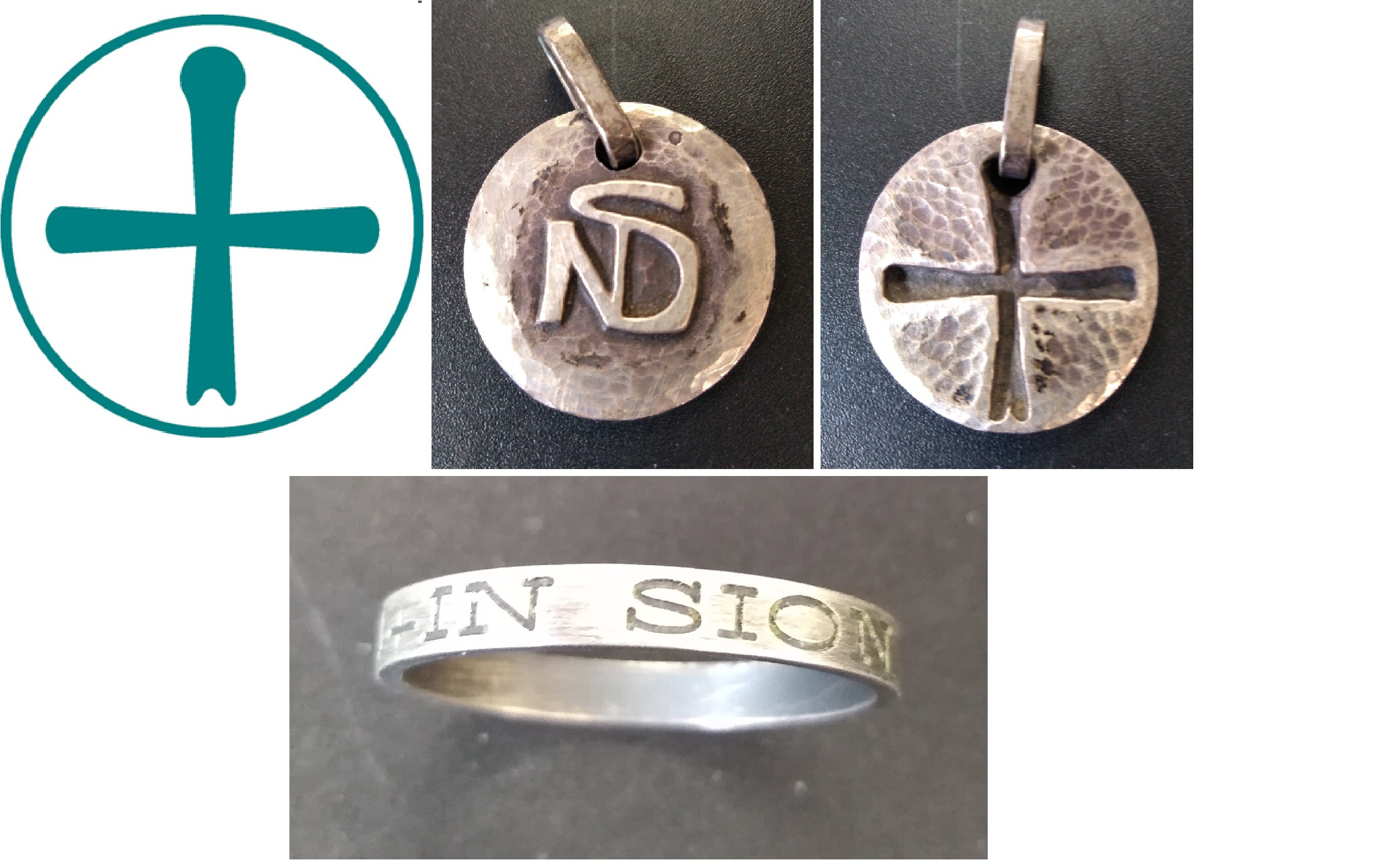 Les symboles de la congrégation Notre-Dame de Sion sous leur différentes formes (médailles, alliance...).